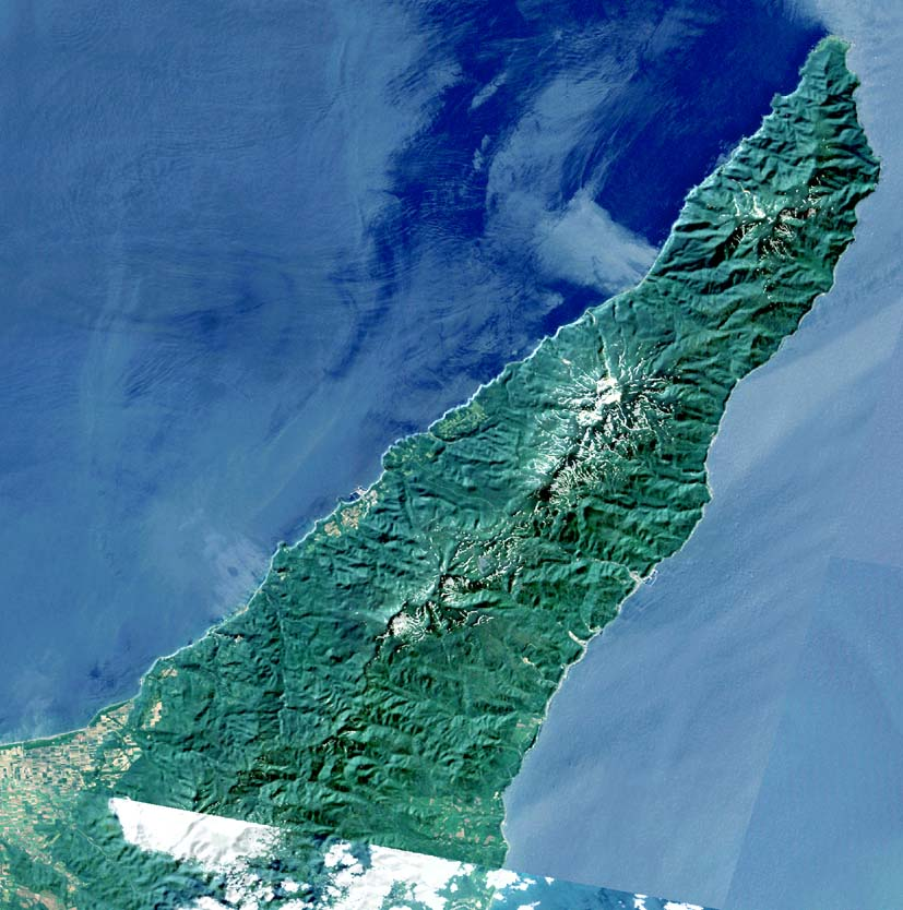 Shiretoko Peninsula, Hokkaido, Japan.